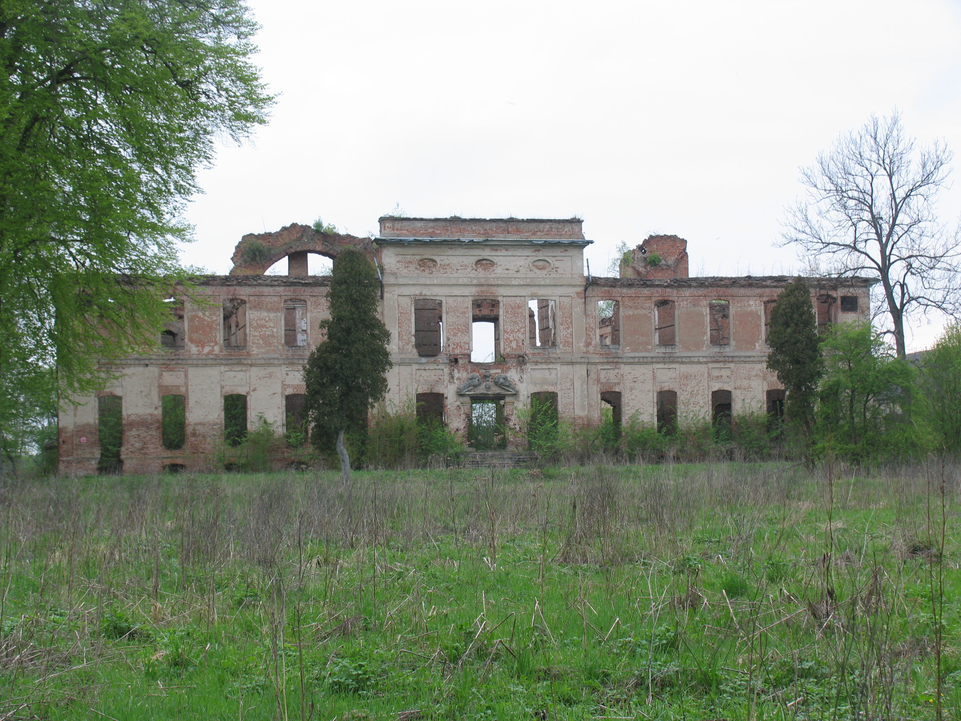 Kamieniec, pałac, 1716-1720